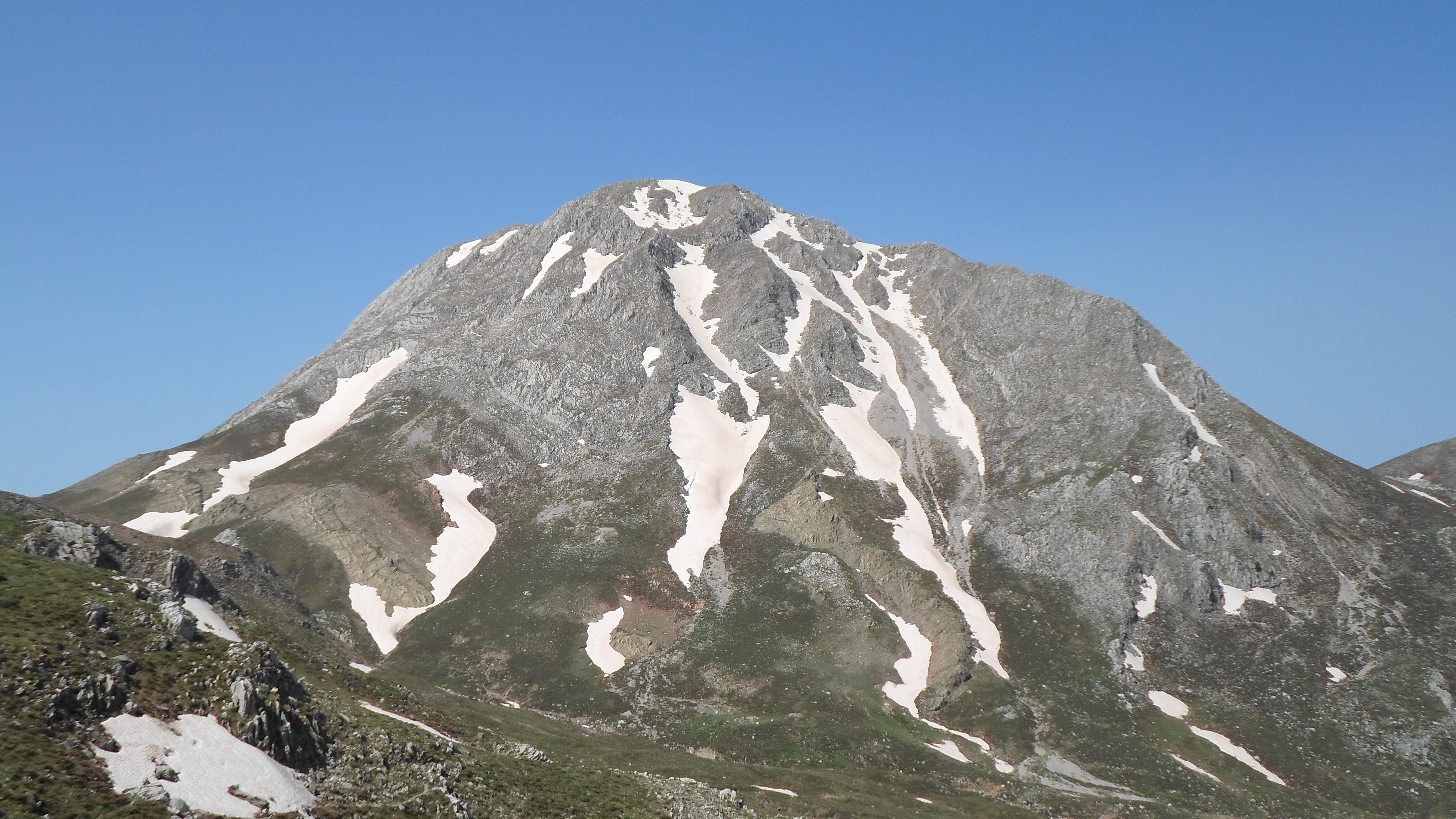 Η ψηλότερη από τις κορυφές του όρους Ερυμάνθου This is a photography of Natura 2000 protected area with ID GR2320008